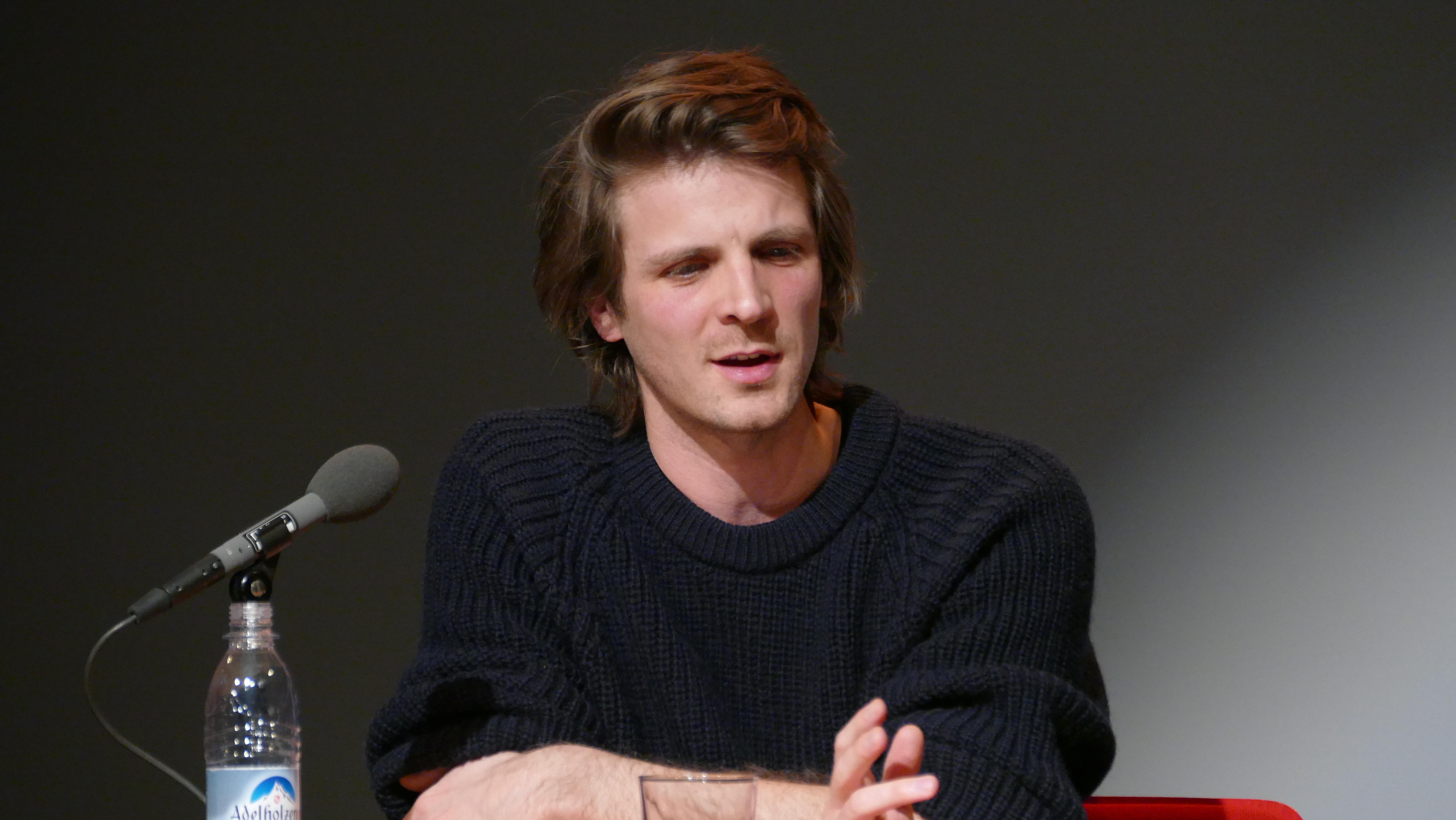 Karl Wolfgang Flender liest bei den Wortspielen 2019 in München aus seinem Roman "Helden der Nacht" (DuMont)